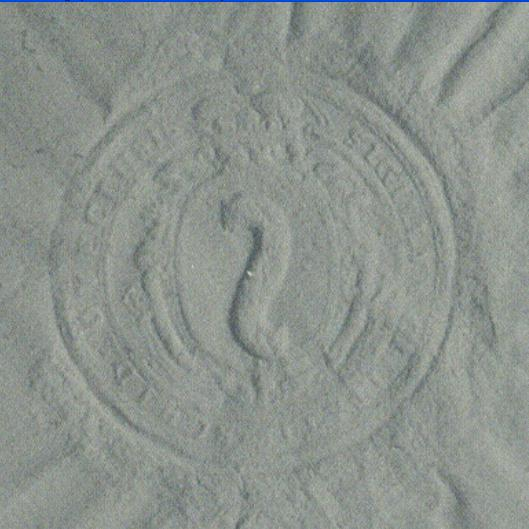 Pieczęć Szydłowca z XVIII